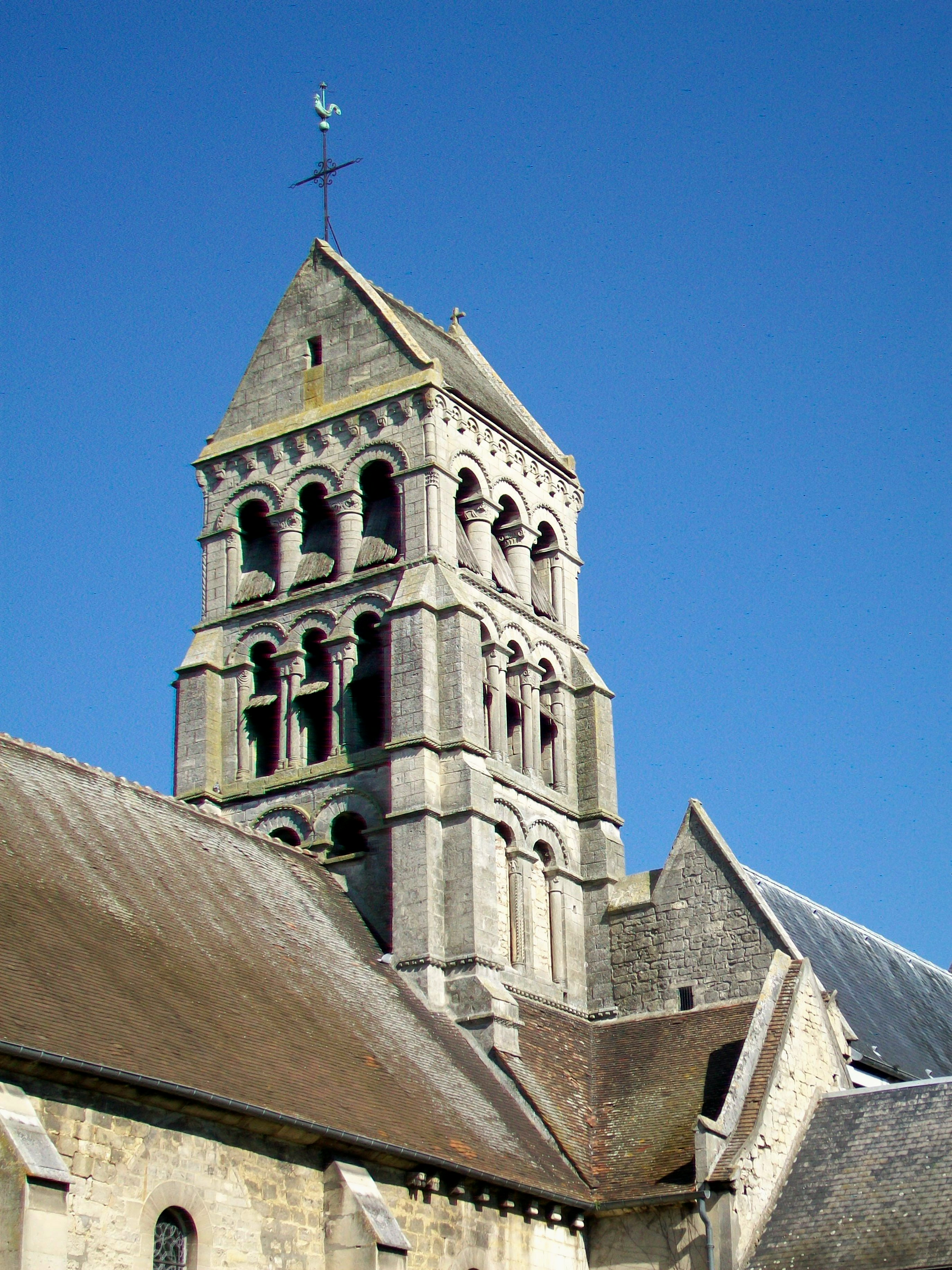 Le clocher roman de l'église Sainte-Maure-et-Sainte-Brigide, réputé comme étant l'un des plus beaux du département.